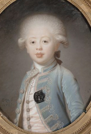 Louis-Antoine d'Artois, duc d'Angoulême (1775-1844)